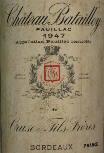 Château Batailley 1947 label